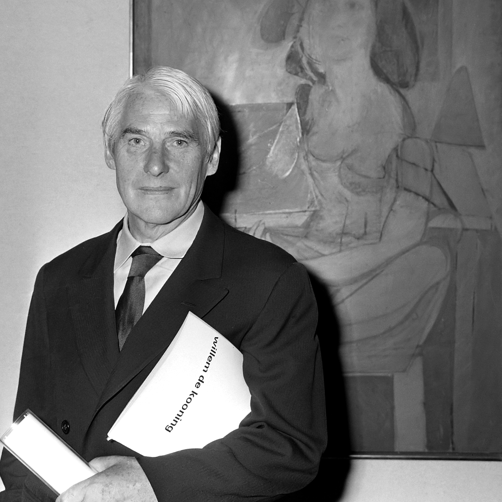 Uitreiking van de Talensprijs 1968 aan Willem de Kooning 19 september 1968